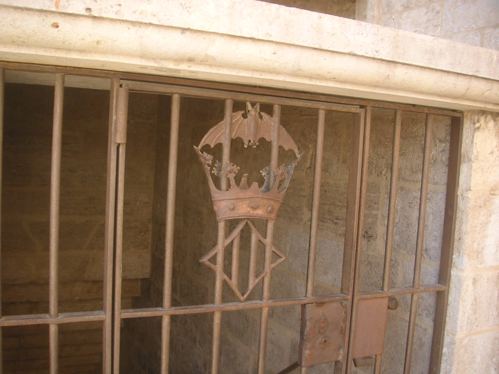 Escudo de Valencia, con la corona del reino y "la rata penada" (murciélago), en una de las puertas de las escaleras interiores.